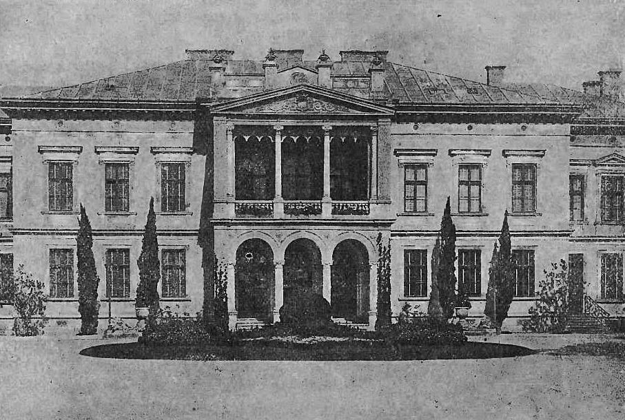 Pałac Badenich w Busku (-1904)